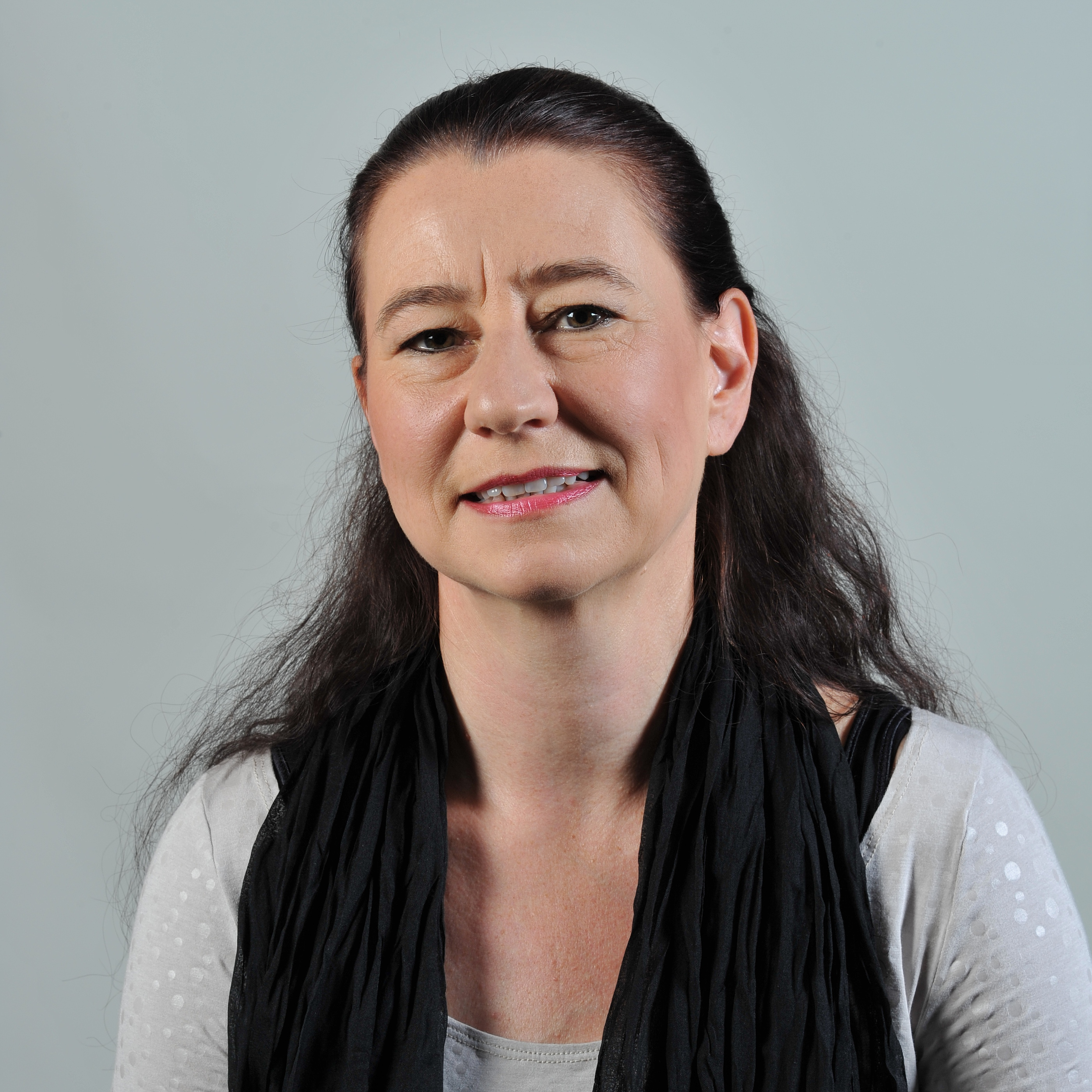 Landtagsprojekt Mecklenburg-Vorpommern 2013: Anne Drescher